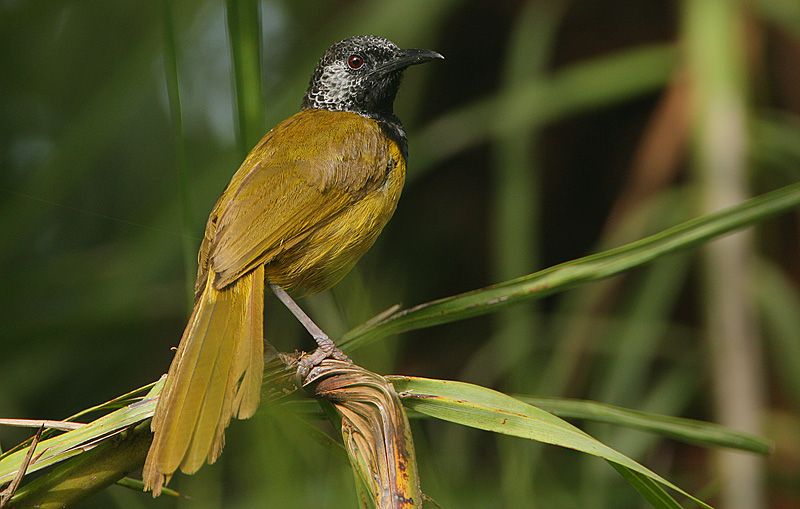 Image taken at Kotu, The Gambia. An adult male.